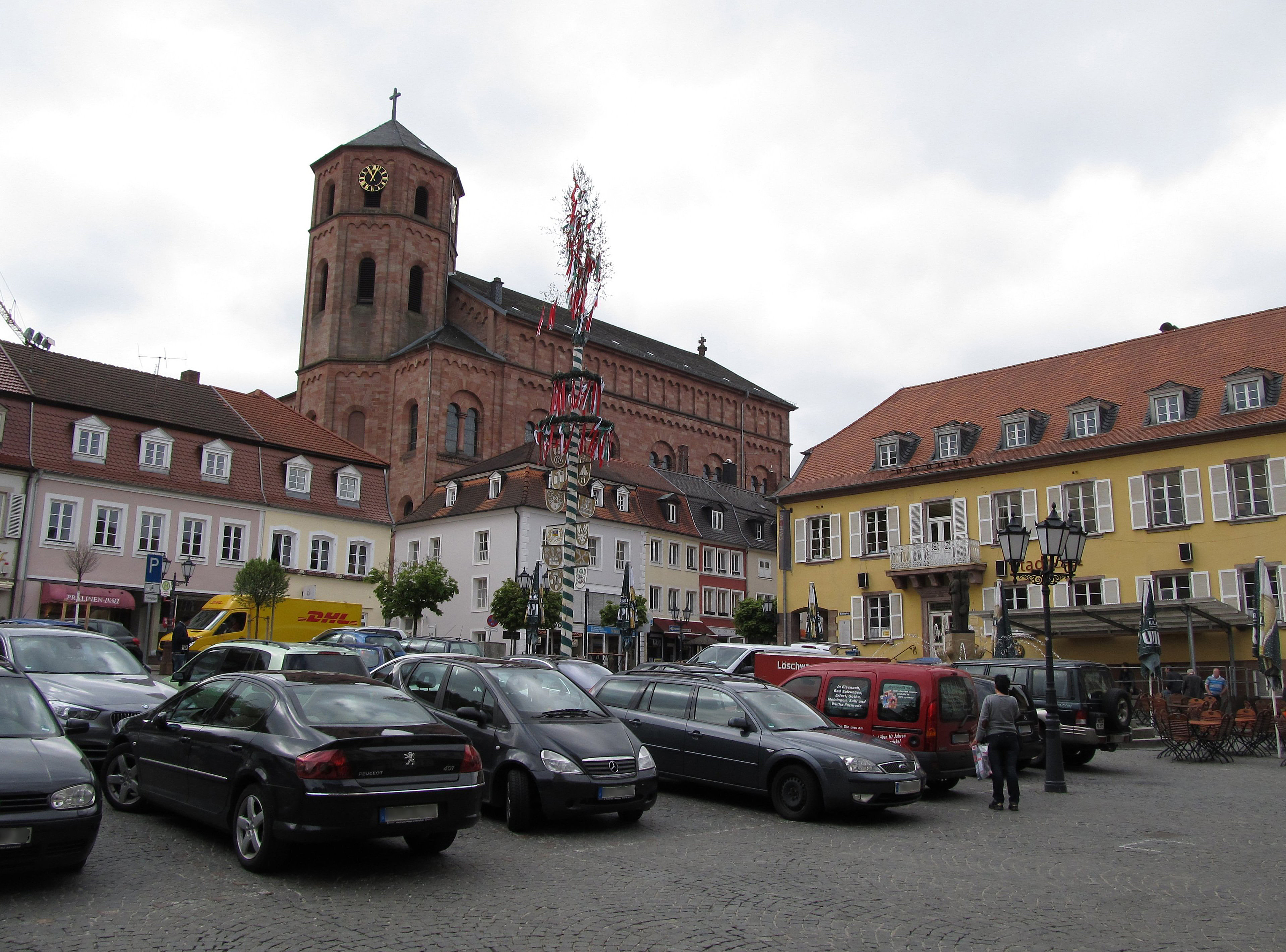 Homburg/Saar, Marktplatz